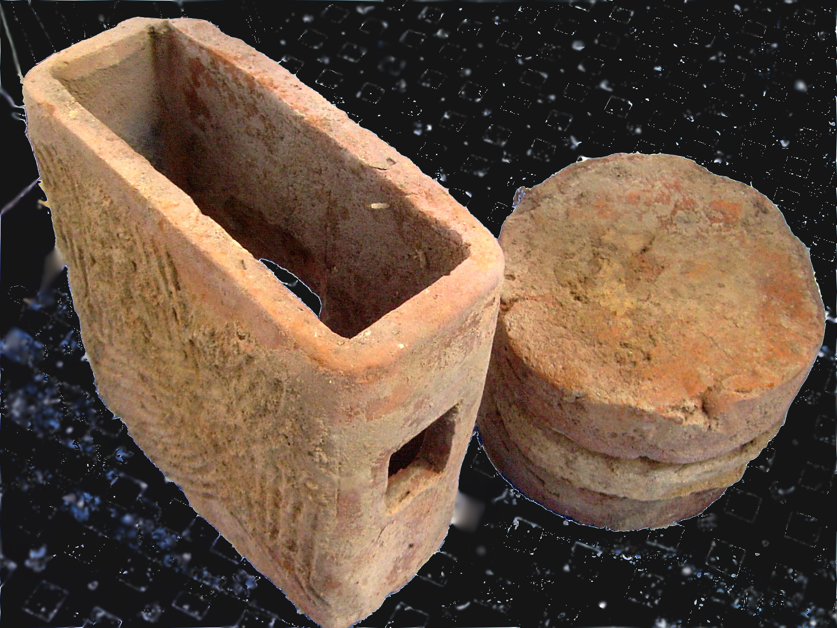 Teile aus der Ausgrabung der römischen Villa in Dernau in 1885.